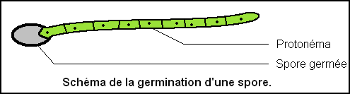 Germination d'une spore en protonéma.